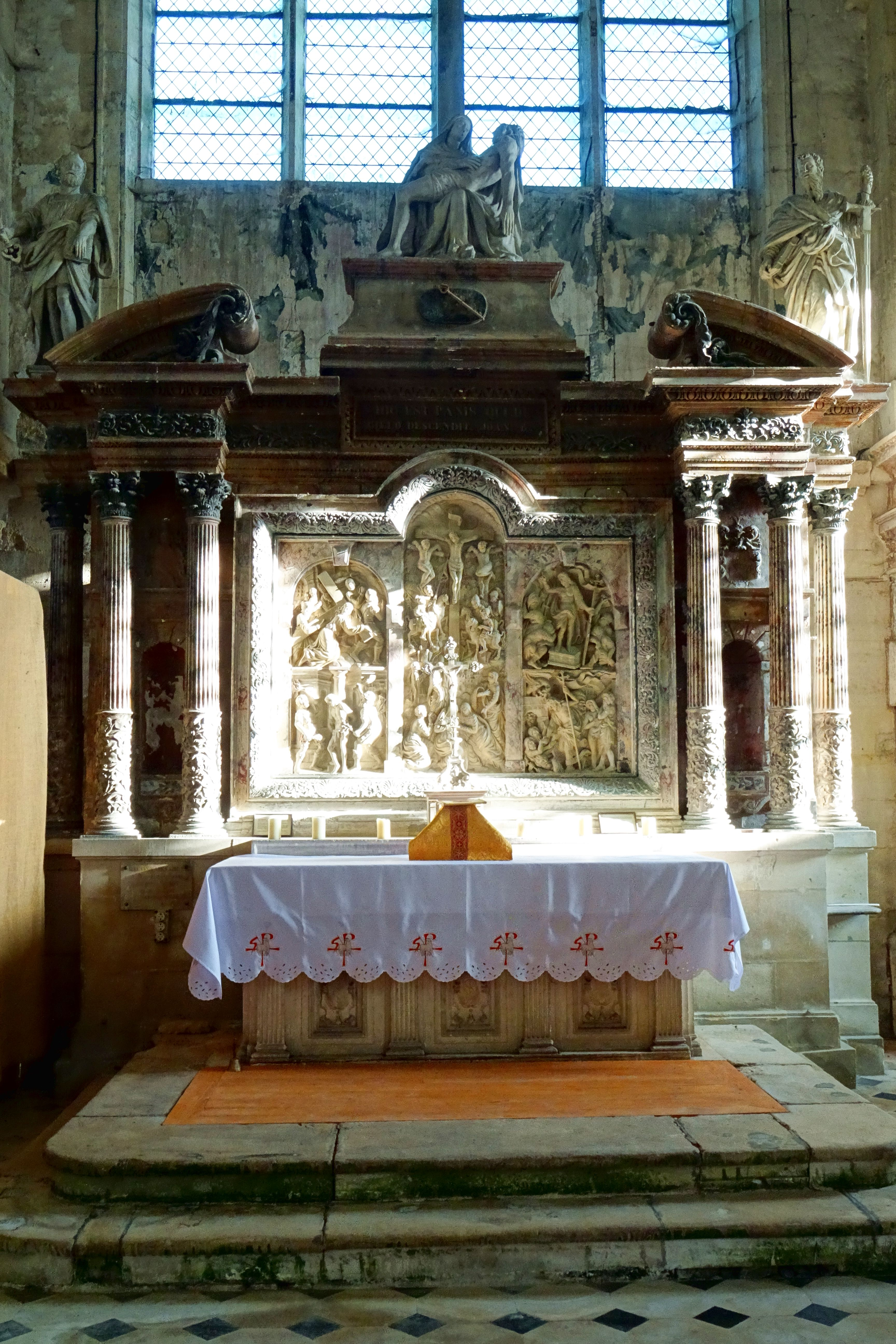 Retable majeur et maître-autel - vue d'ensemble.